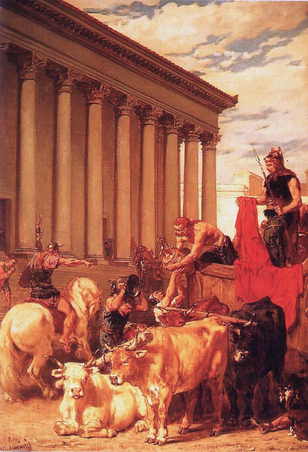 Le Sac de Rome par Evariste-Vital Luminais. New-York, Sherpherd Gallery.